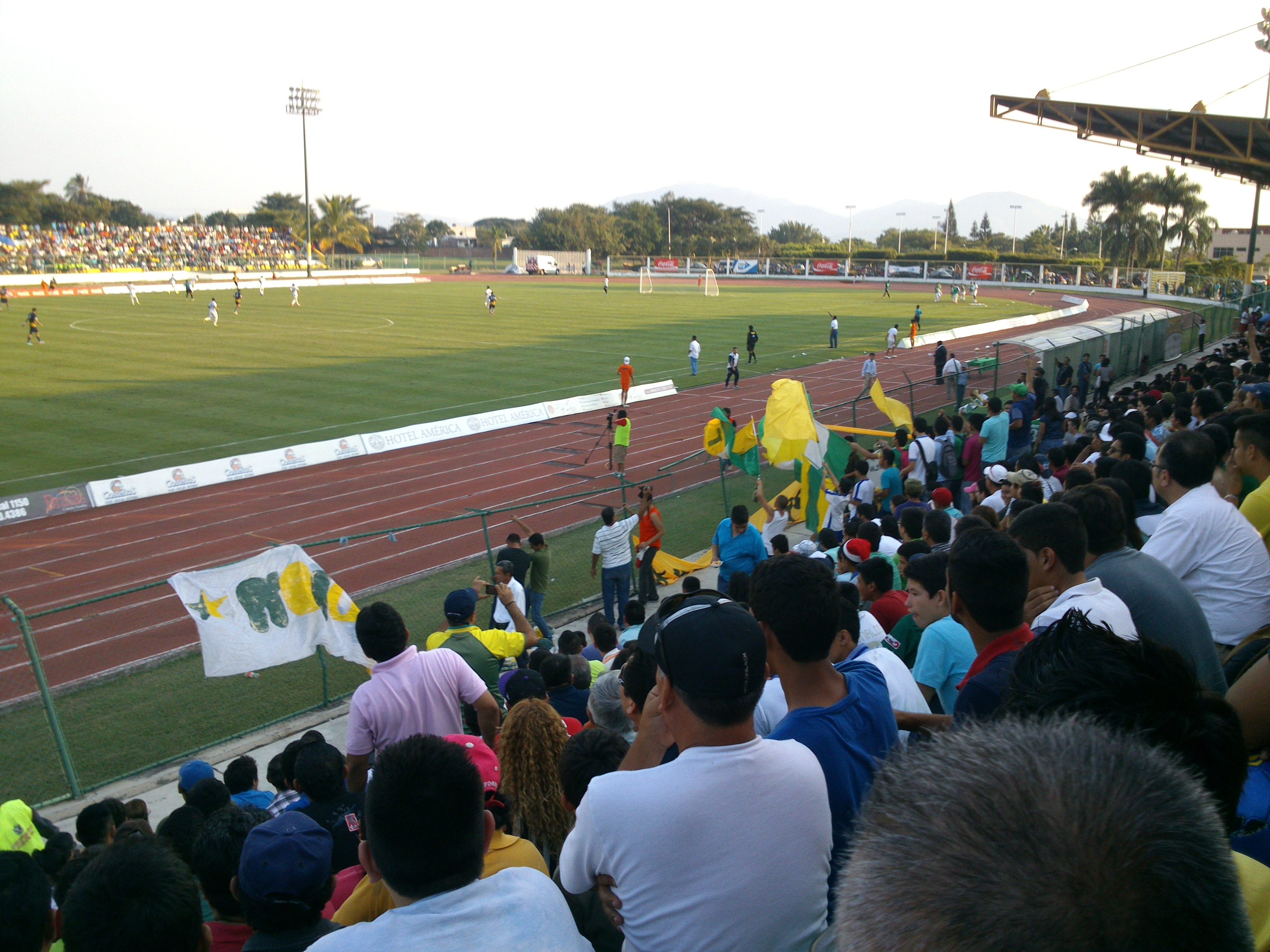 Estadio durante la final de ida del torneo apertura 2013. Encuentro entre Loros y Linces